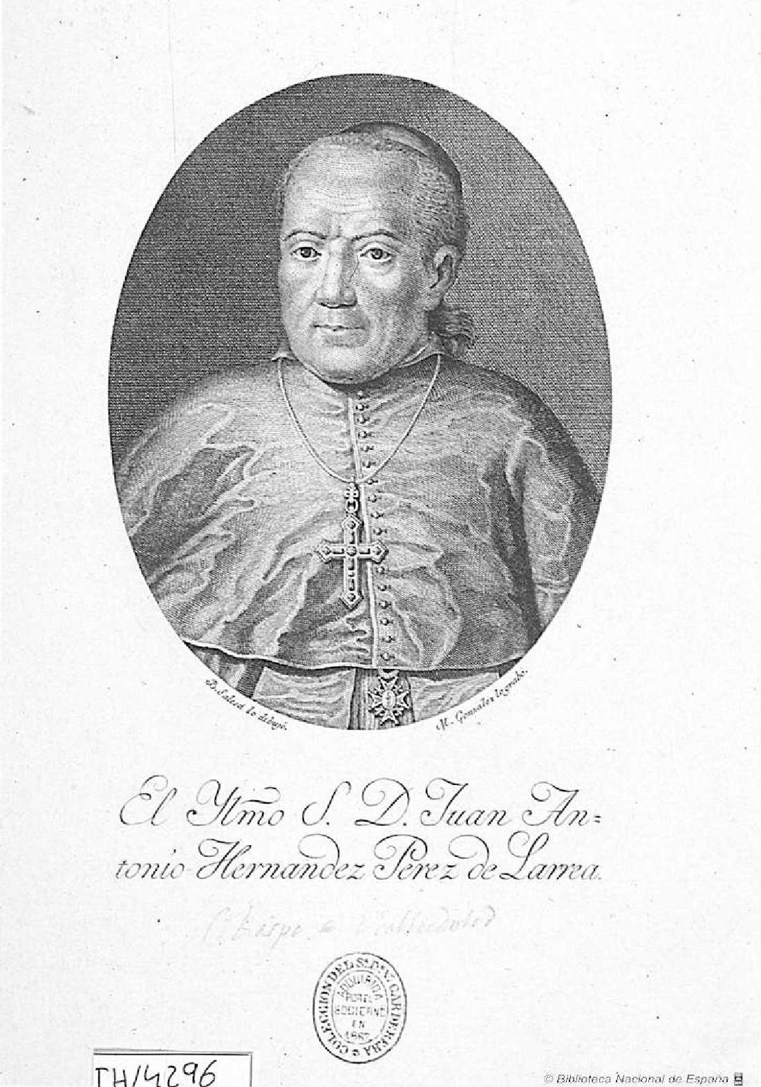 Retrato de Juan Antonio Hernández y Pérez de Larrea, estampa, aguafuerte y buril, grabado por Mateo González según dibujo de Buenaventura Salesa